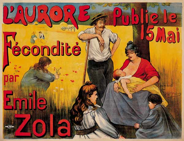 Placard publicitaire pour le roman Fecondité. ca 1900